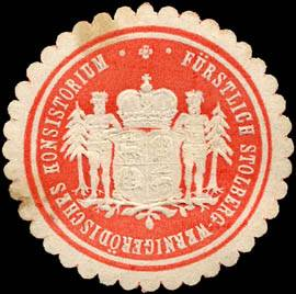 Sealing stamp Title: Fürstlich Stolberg - Wernigerödisches Konsistorium Description: rot, weiß, geprägt Place: size: 4 cm